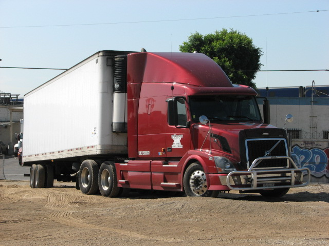 VOLVO TRUCK